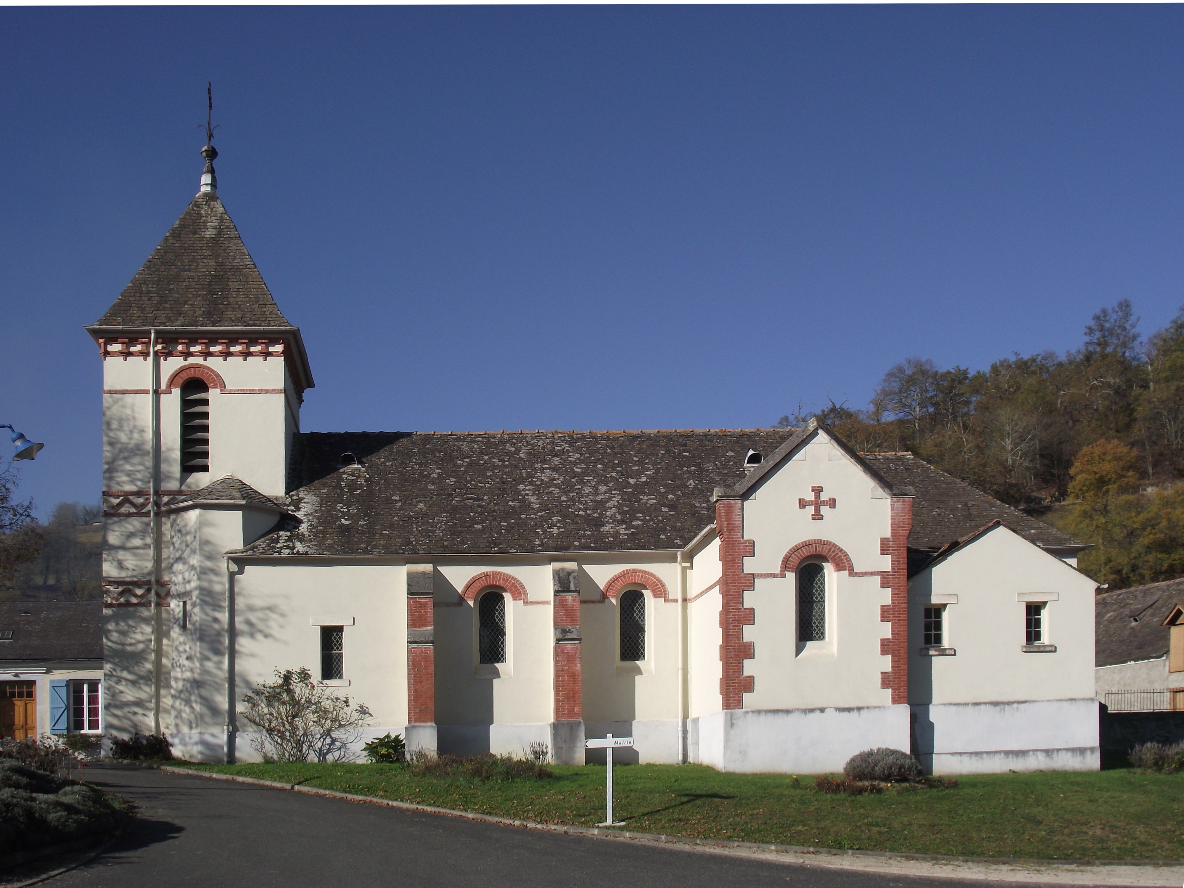 Église Saint-Jean-Baptiste d'Escoubès (Escoubès-Pouts, Hautes-Pyrénées, France)